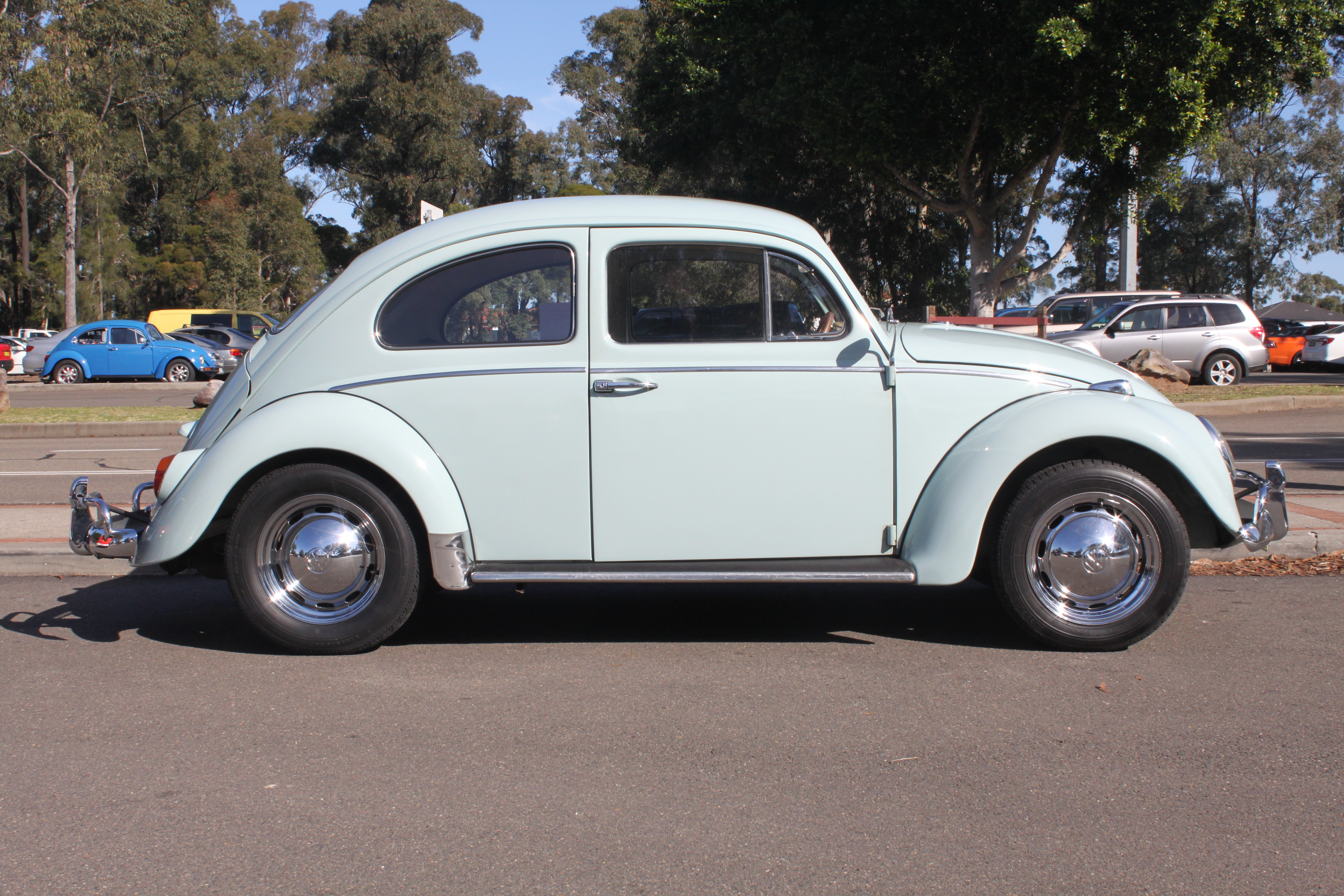 1966 Volkswagen Type 1